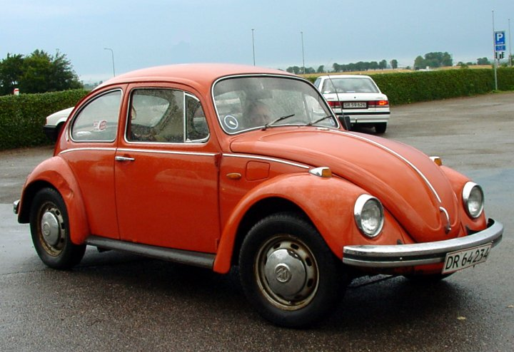 Volkswagen Beetle